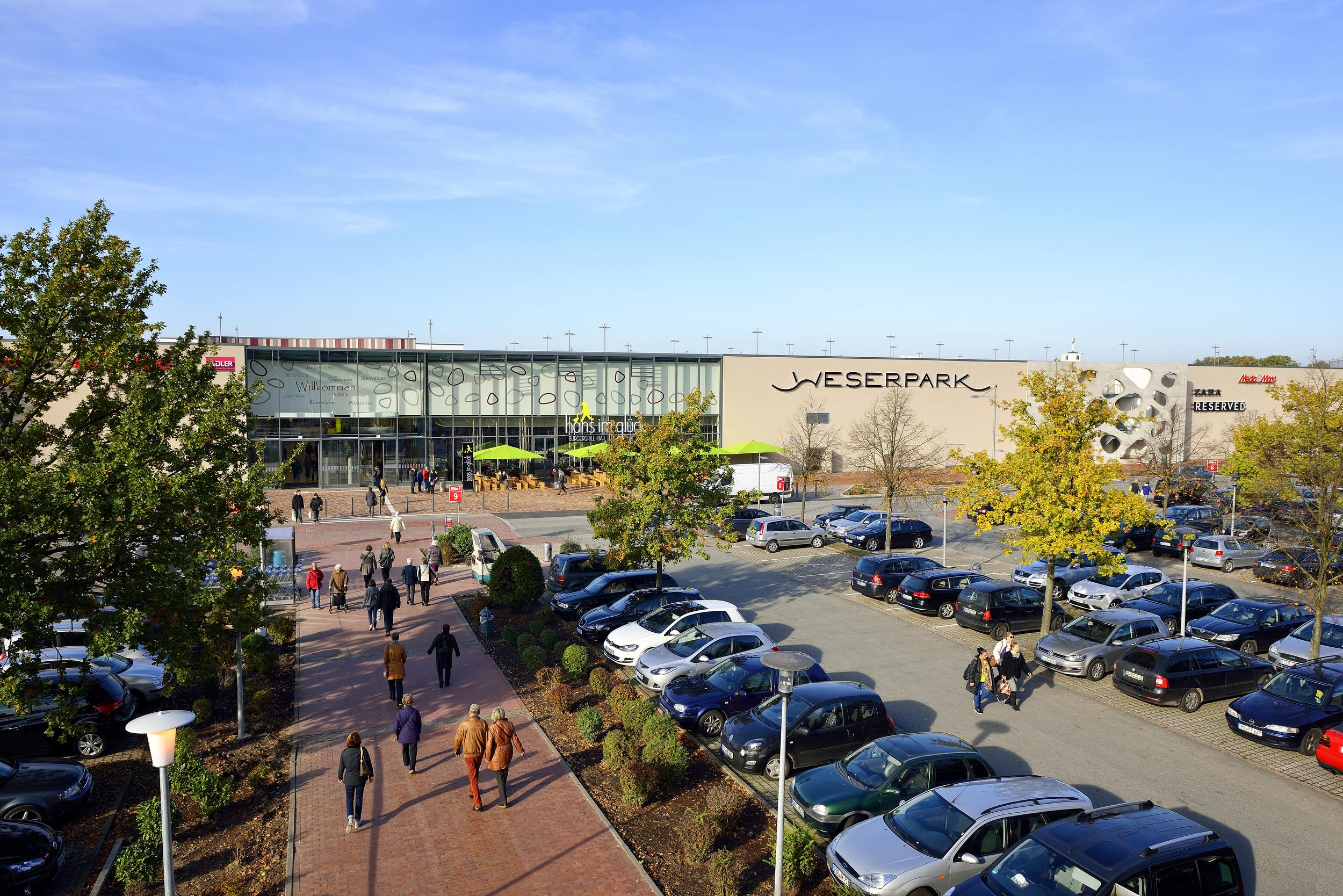 Nach 17 Monaten Bauzeit öffnete der um 12.500 m² vergrößerte Weserpark am 23. Oktober 2014 seine Pforten. Der Weserpark bietet jetzt auf 66.000 m² insgesamt 170 Shops sowie Gastronomie und Dienstleistungen. Ein neuer Food Court mit über 380 Sitzplätzen und 14 Restaurantkonzepten erweitert das gastronomische Angebot. Auch die Bestandsmall erhielt ein neues Innendesign und hat sich damit dem neuen Konzept angepasst. Bereits im vergangenen Frühjahr wurde ein neues, fünfgeschossiges Parkhaus mit weiteren 1.200 Parkplätzen in Betrieb genommen, so dass der Weserpark nun über insgesamt 4.800 kostenlose Parkplätze verfügt. Insgesamt wurden 65 Mio. Euro in das Center investiert, das durch die Erweiterung zu einem der größten Shopping Center Norddeutschlands wird. Das Centermanagement liegt in den Händen der MEC METRO-ECE Centermanagement GmbH & Co. KG, in deren Auftrag die ECE Projektmanagement GmbH & Co. KG die Vermietung durchführte. Für Projektentwicklung und Baumanagement war die METRO PROPERTIES zuständig. Bauherr und Eigentümer ist ein Gemeinschaftsunternehmen der Steenken Gruppe, Münster, und der METRO PROPERTIES, Düsseldorf.